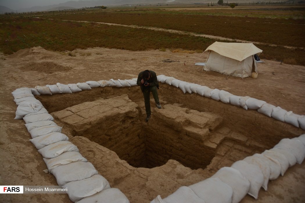 کاوش در ریوی تپه ریوی در محوطه‌ای ۱۱۰ هکتاری و در ۵ کیلومتری آشخانه در حوالی روستای نجف قرار دارد. تاکنون ۵ فصل کاوش باستان‌شناسی در این منطقه به اتمام رسیده است. در این کاوش‌ها بقایای استقراری از دوره‌های ۳۵۰۰ سال قبل ازجمله مفرغ و همچنین دوران آهن، هخامنشی، اشکانی، ساسانی و اسلامی به‌دست‌آمده است.